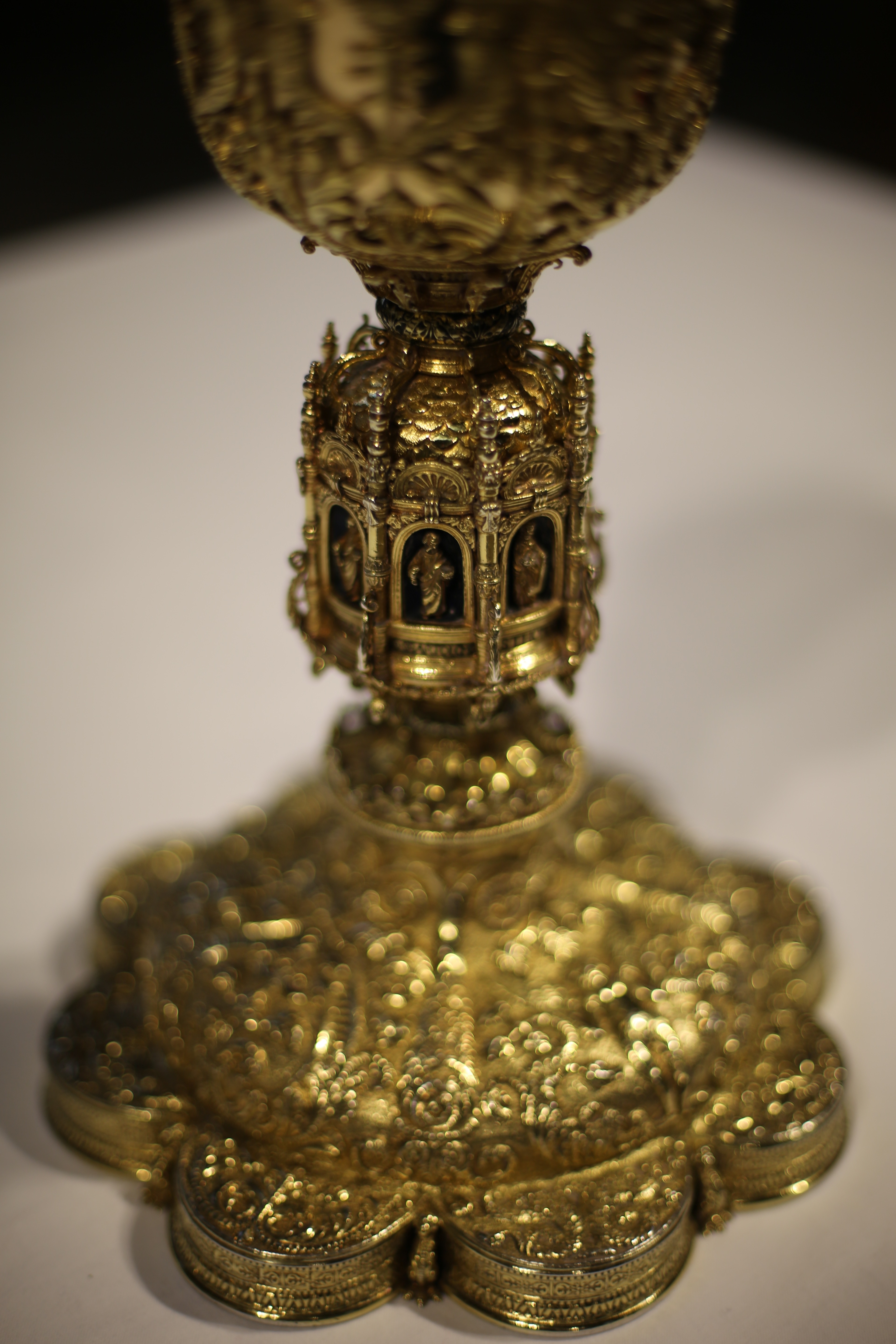 Vue sur le nœud du calice, monté.